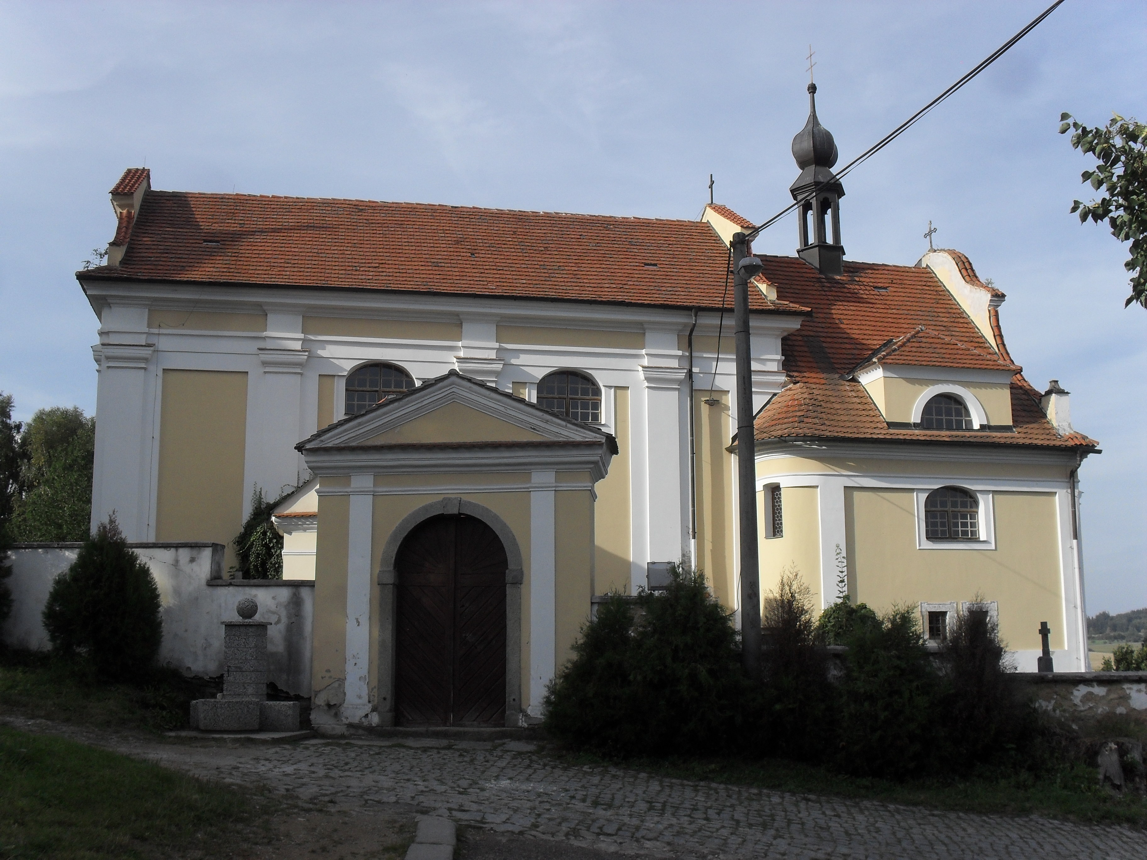 Fotografie pořízena v obci Kotouň.